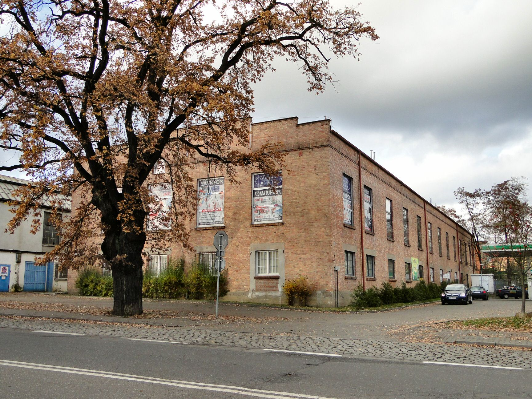 Dawna hala fabryczna FMS "Polmo" przy ul. Wojska Polskiego w Szczecinie